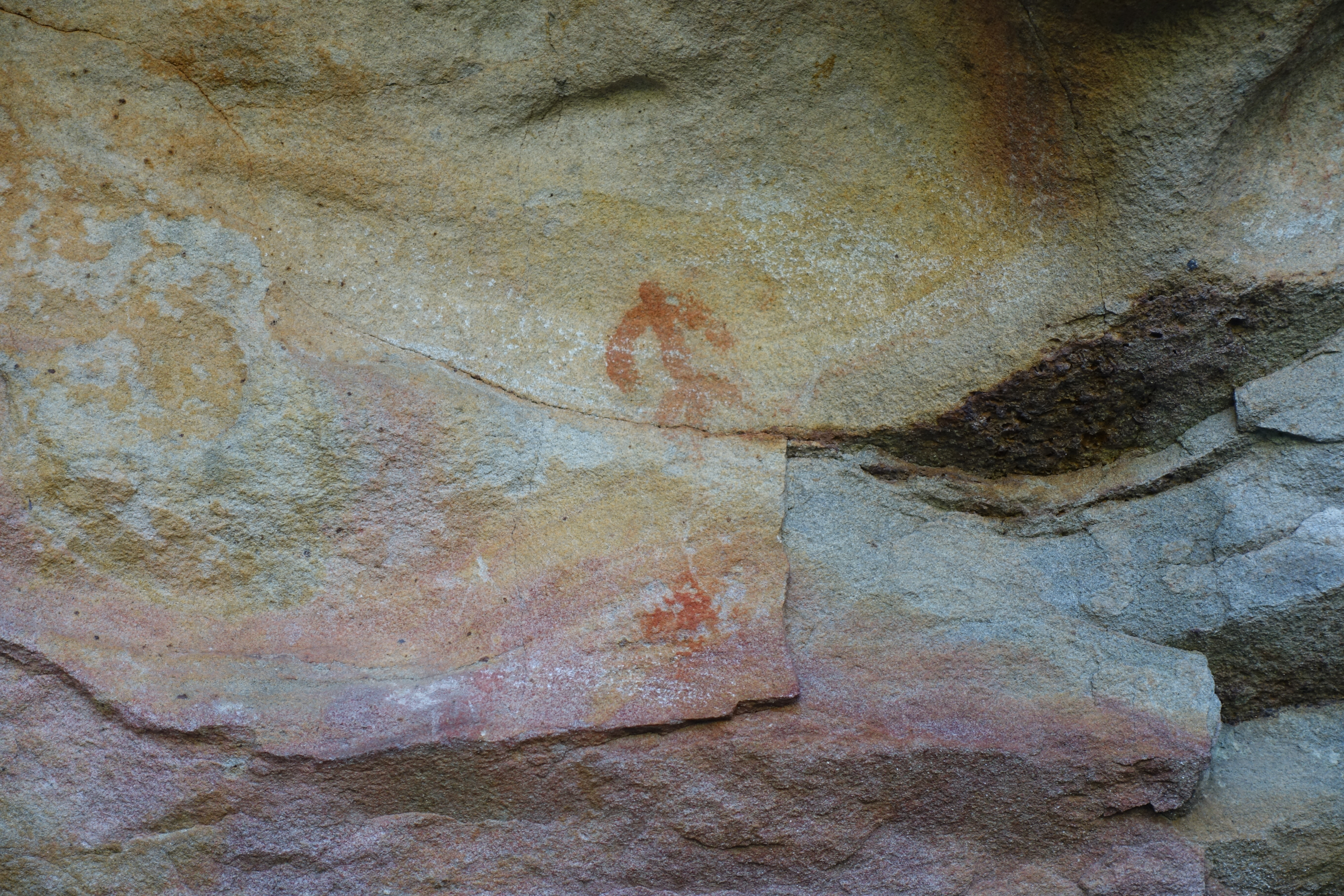 Estación rupestre de Las Covatillas, en el monte Valonsadero (Soria, España).